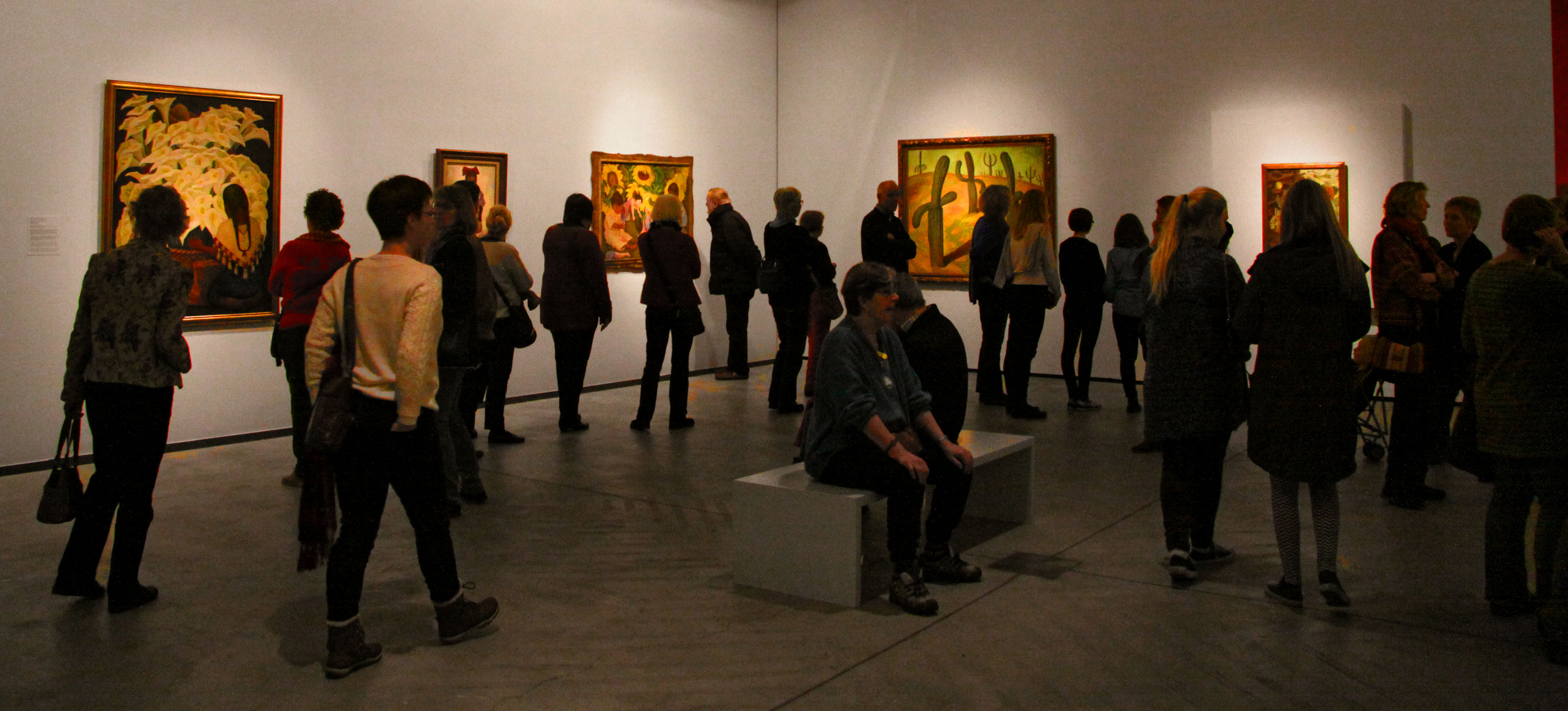 Ishøj. Frida Kahlo udstilling på Arken.